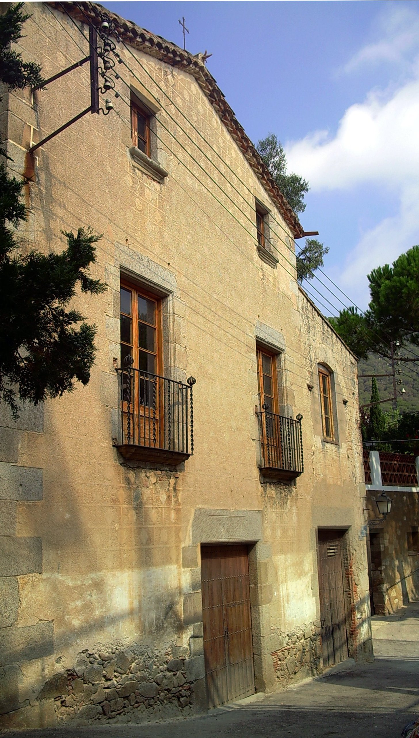 La casa del terçó, o Casa de les Monges, Escola de les Nenes (1890), avui Casal Parroquial. L'origen de la paraula Terçó es troba en la tercera part de l'impost que a l'edat mitjana es lliurava a l'esglèsia, i que es dipositava al temple, al clergat i a la seu episcopal. L'edifici va ser destruït per una torrentada; l'any 1740 va ser reconstruït pel prevere Gabriel Martí. Premià de Dalt